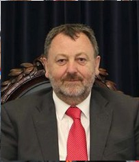 Denis O Donovan at Public meeting